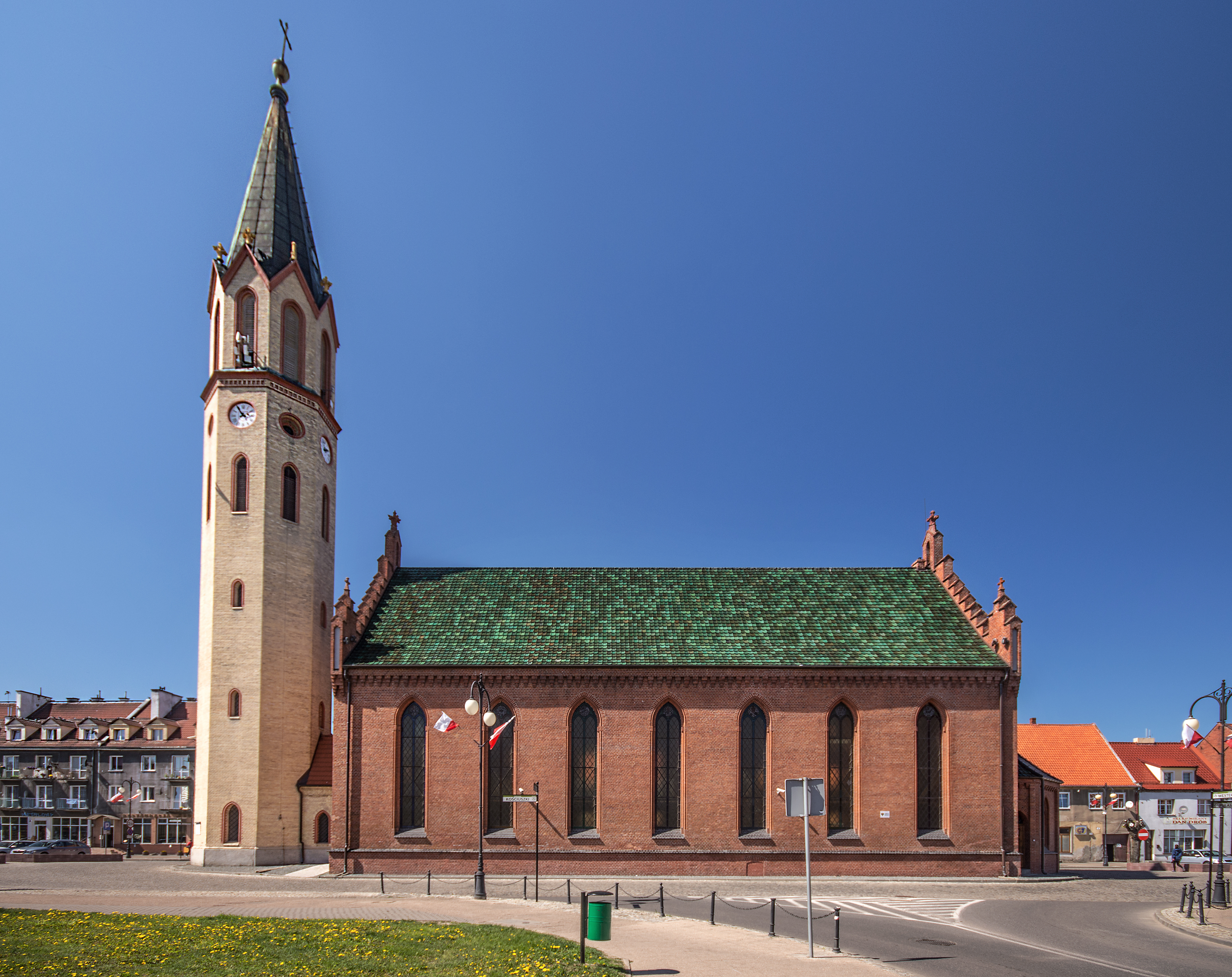 Nowy Staw, kościół ewangelicki, ob. rzymsko-katolicki, 1804, 2 poł. XIX